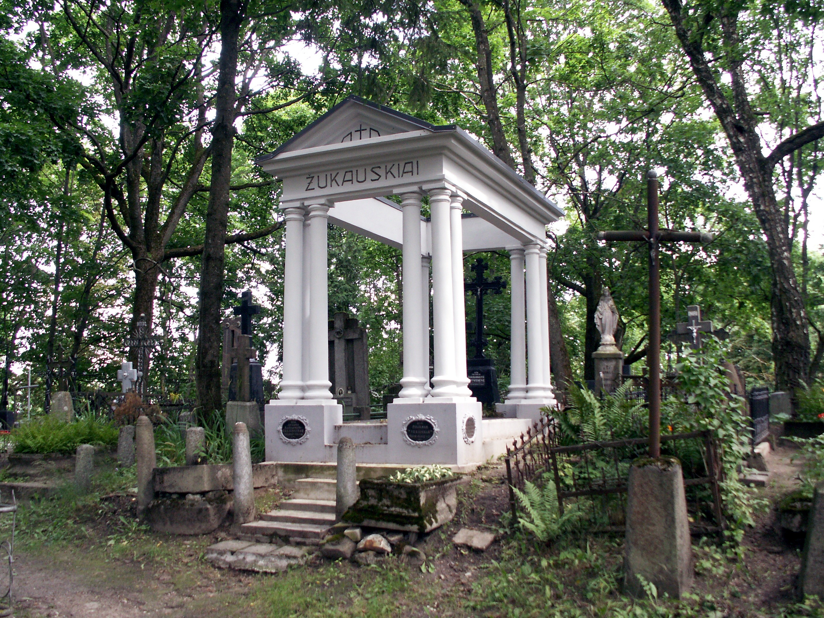 Šiaulių senosios kapinės. Žukauskių šeimos kapas.